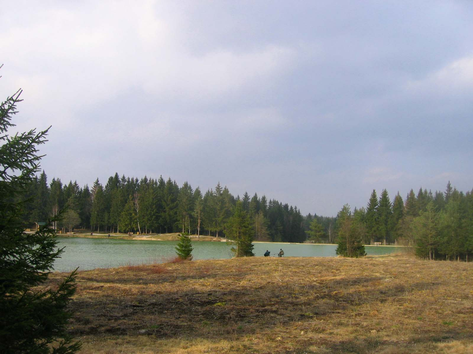 Bloke Lake (Bloško jezero), Slovenia photo:Ziga 16:20, 29 March 2007 (UTC)